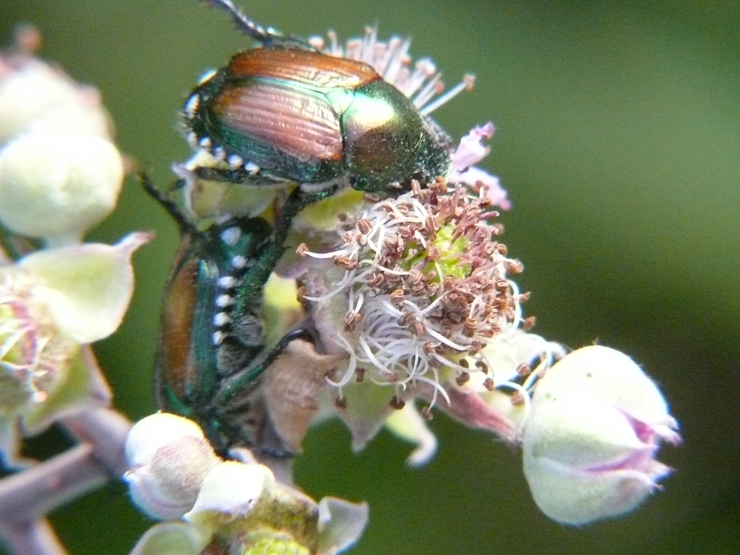 Popillia japonica